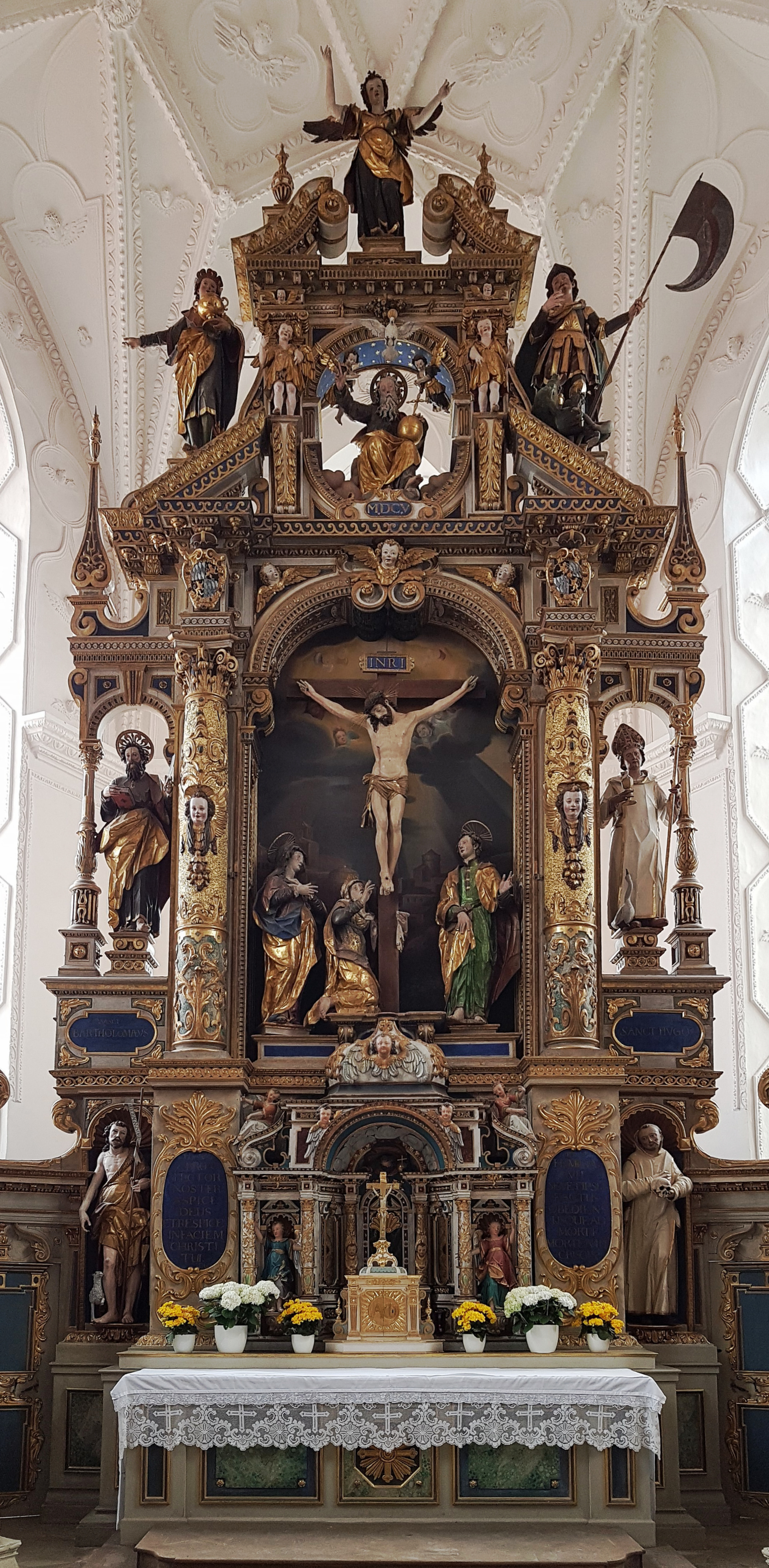 St. Vitus (Regensburg), Hochaltar